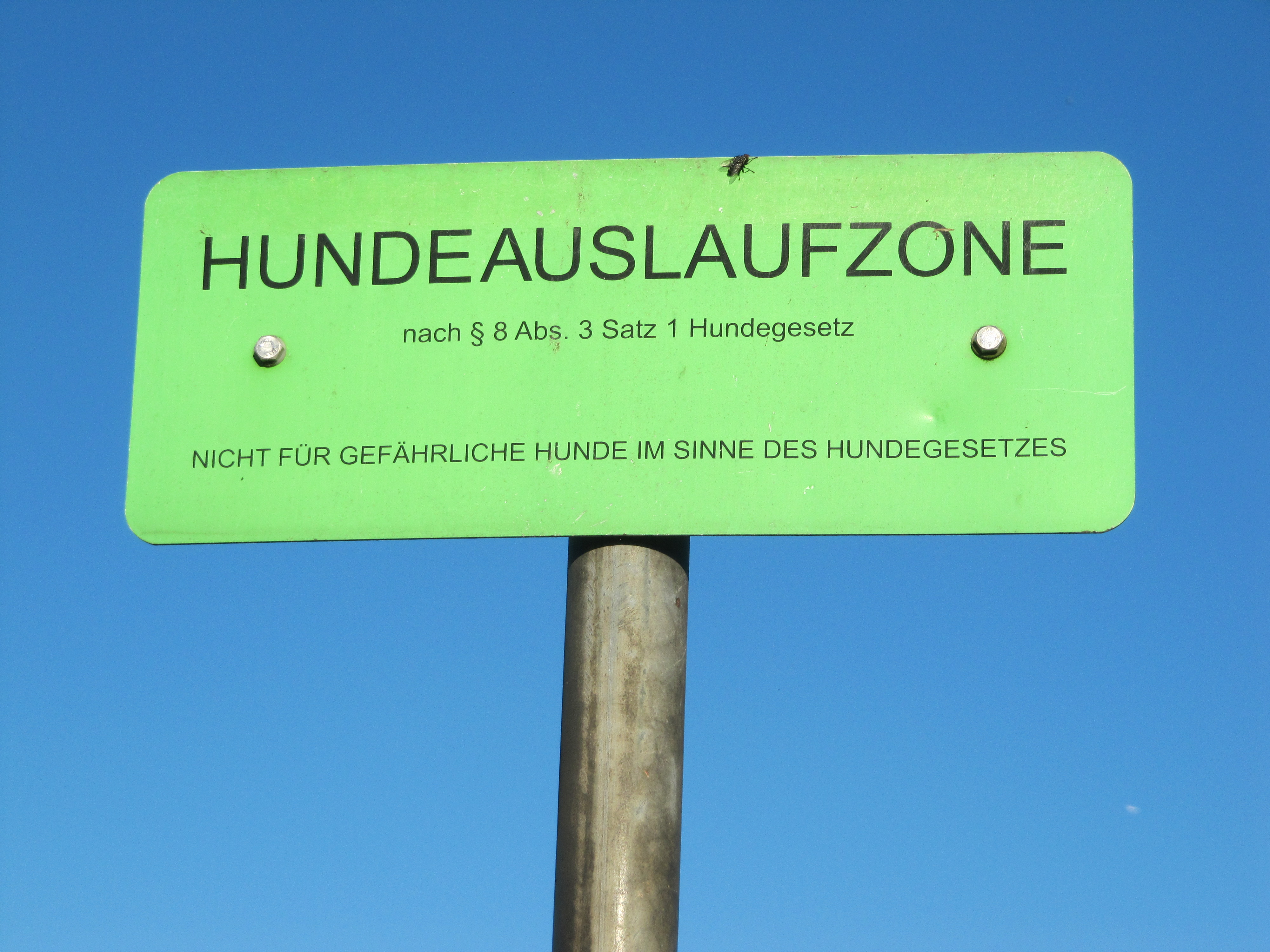 Schild Hundeauslaufzone Hamburg (Horner Rennbahn)